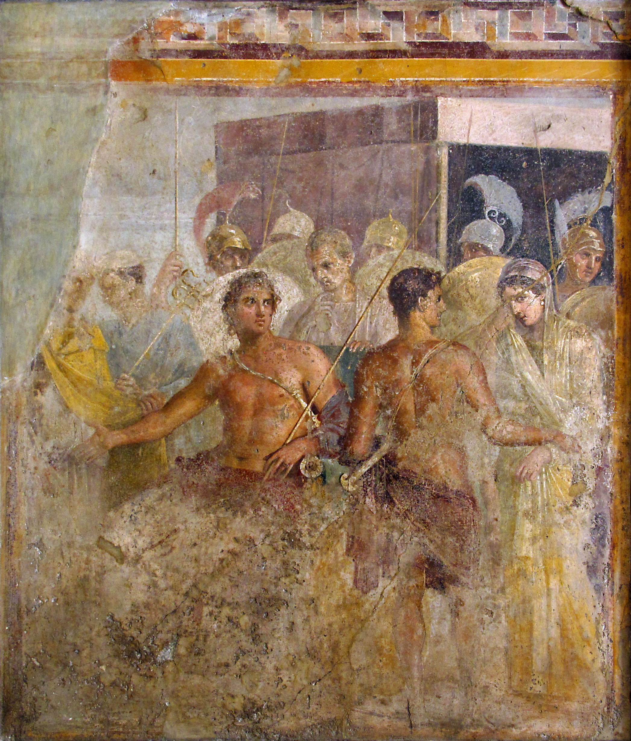 Ancient Roman frescos in the Museo Archeologico (Naples)